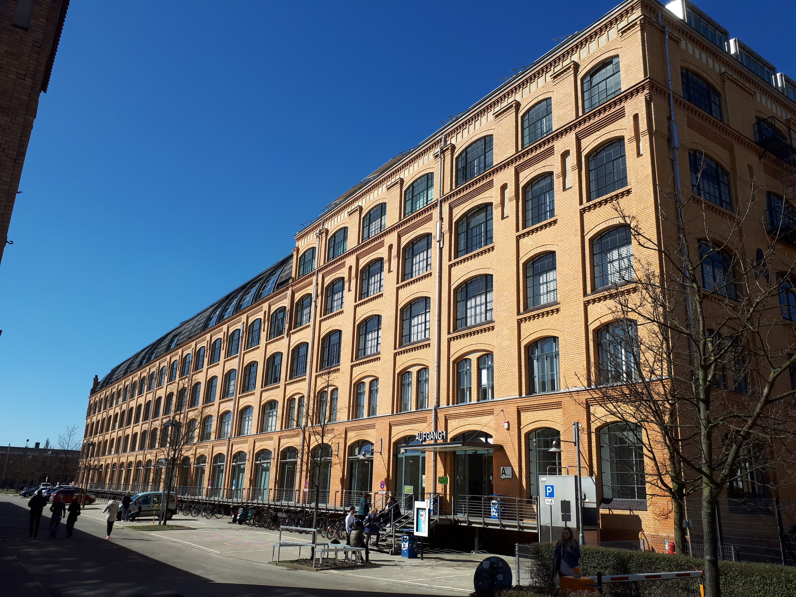 Oberschöneweide HTW Gebäude A; Dekanat Fachbereich 5